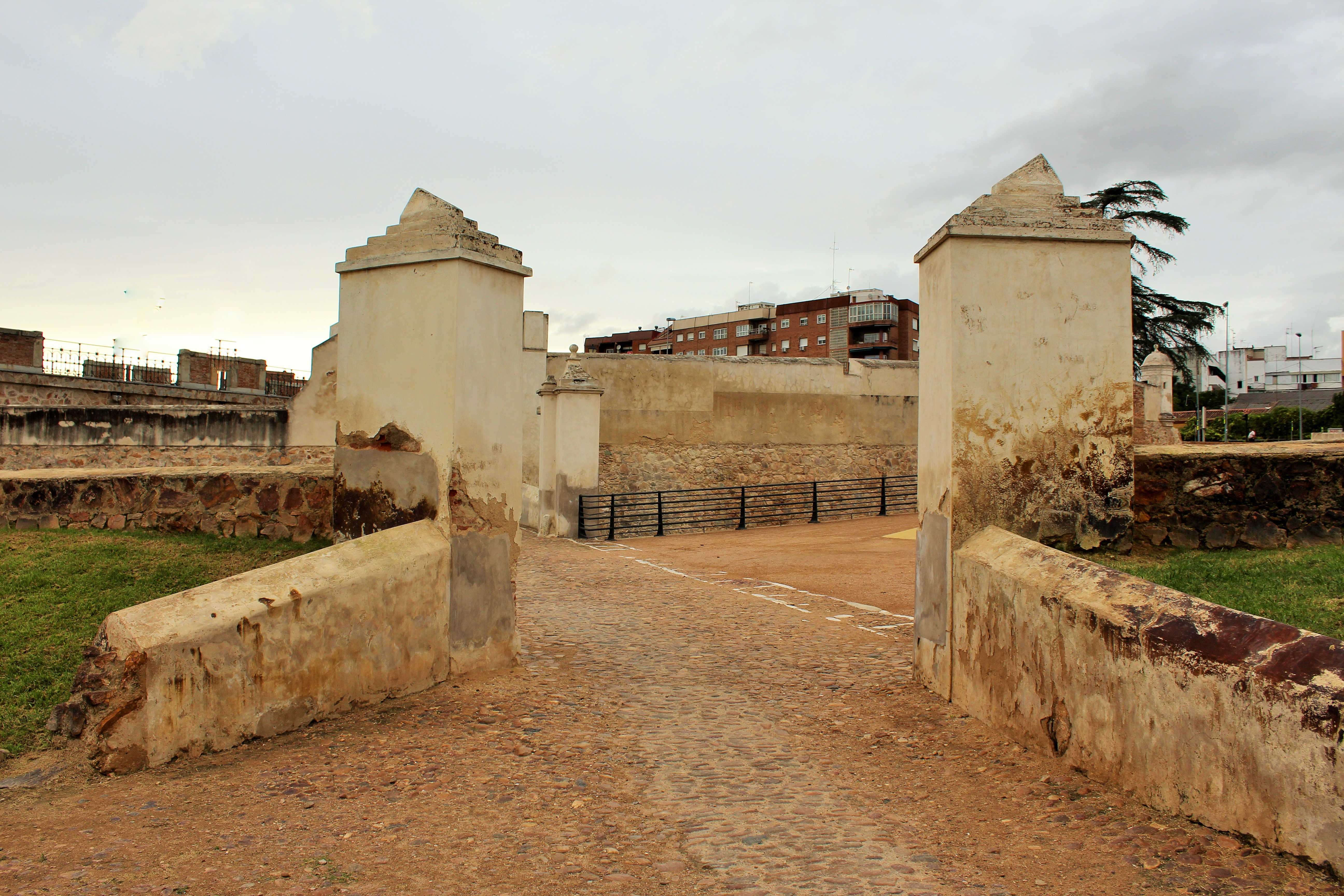 Ante-puerta de la Puerta de San Vicente.